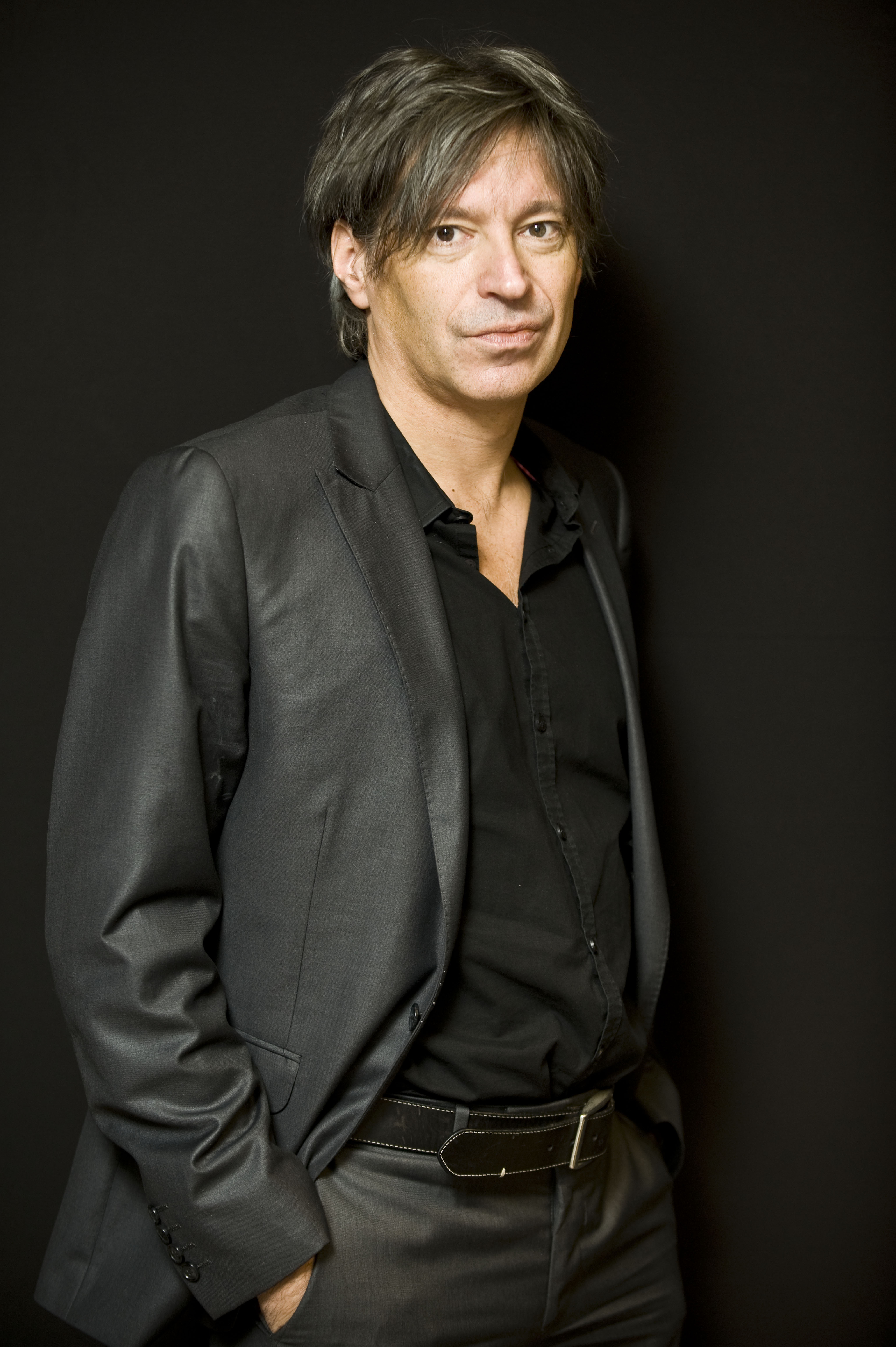 Advocaat Walter Van Steenbrugge